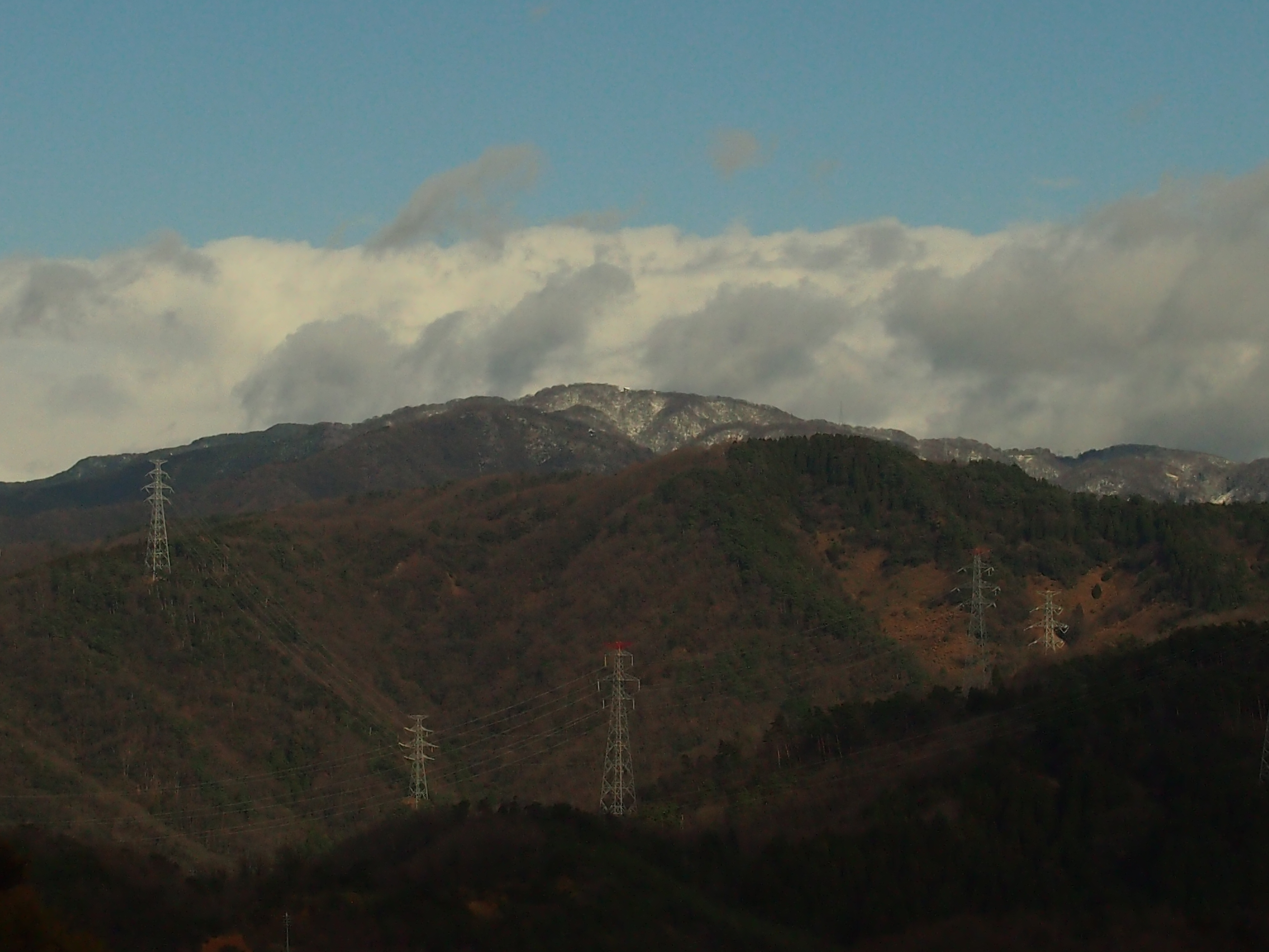 敦賀市天筒山より見た鉢伏山